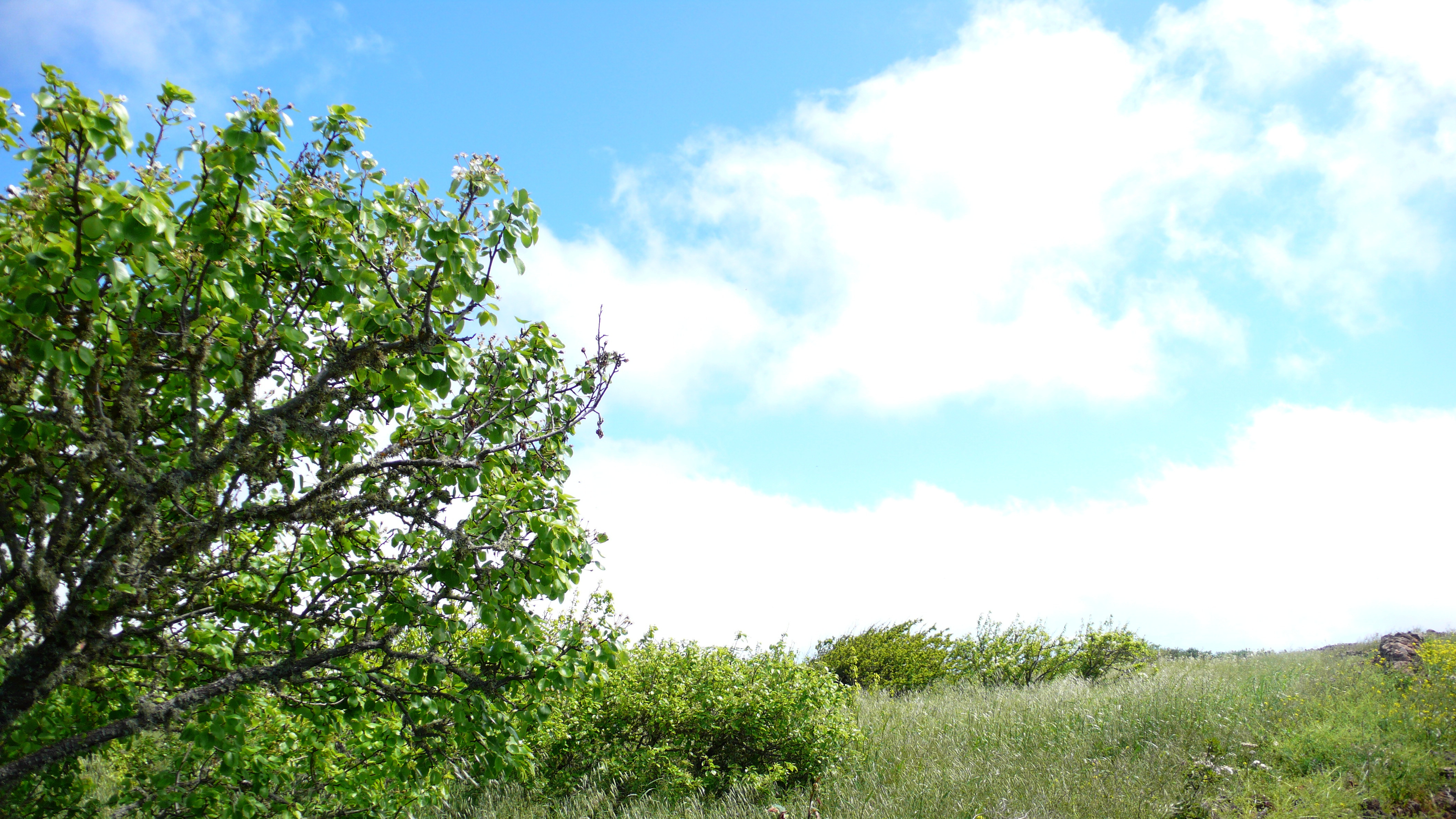 Frutales en Isora (El Hierro)